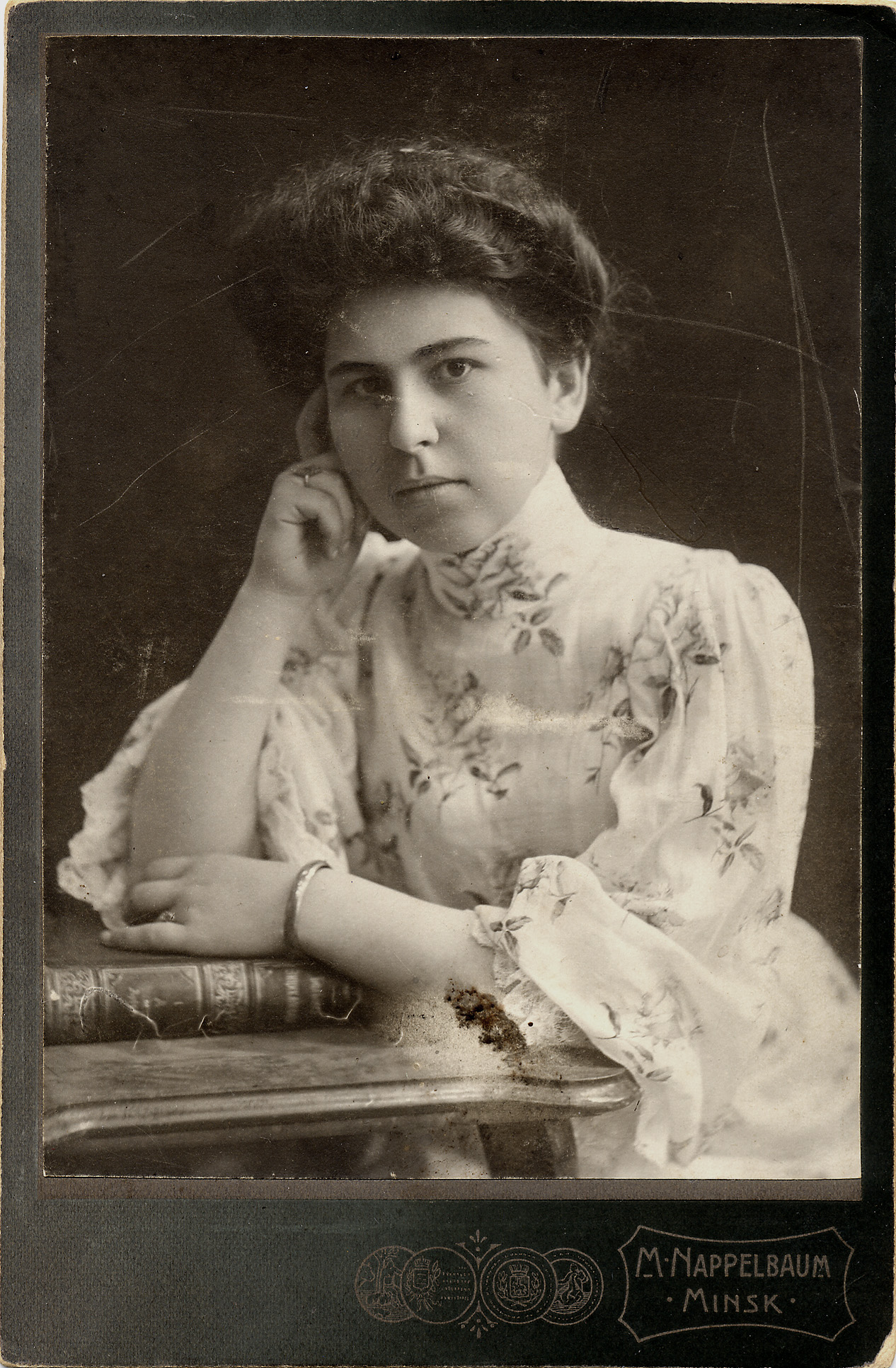 Майсей Напельбаўм. Партрэт Аляксандры Дашкевіч. 1910.